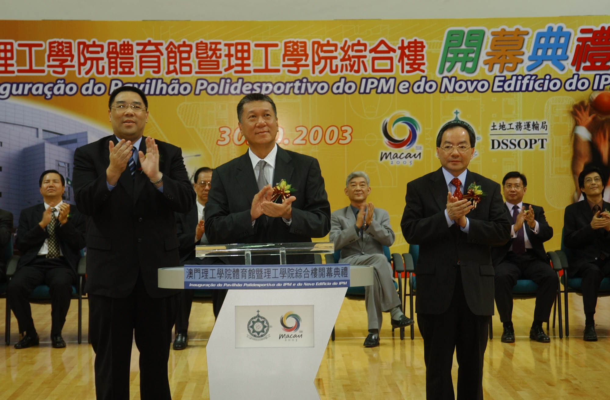 Inauguração do Pavilhão Polidesportivo do Institito Politécnico de Macau e do Novo Edifíico do Institito Politécnico de Macau